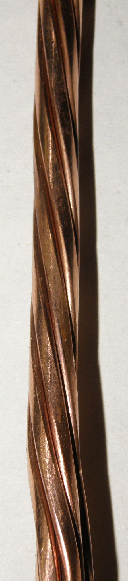 Kupferseil mit S-Schlag-Wicklung